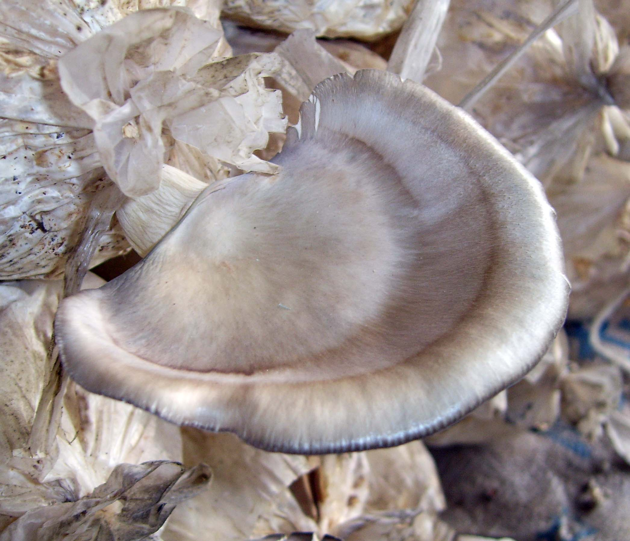 平菇